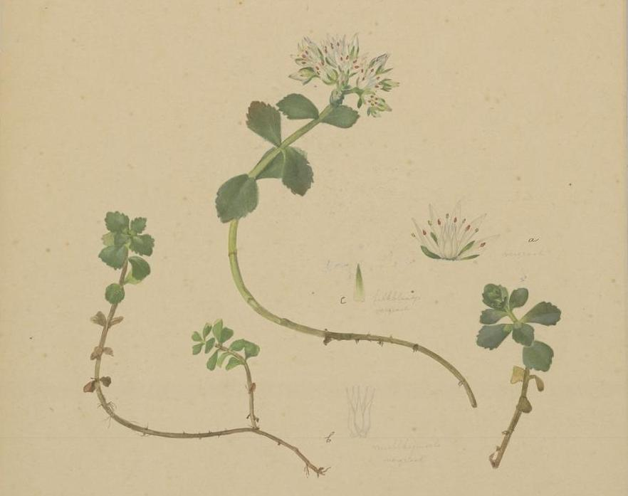 Sedum spurium von Bieberstein